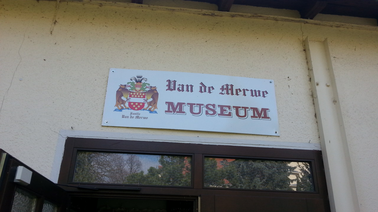 Museumseingang Schloss Biendorf